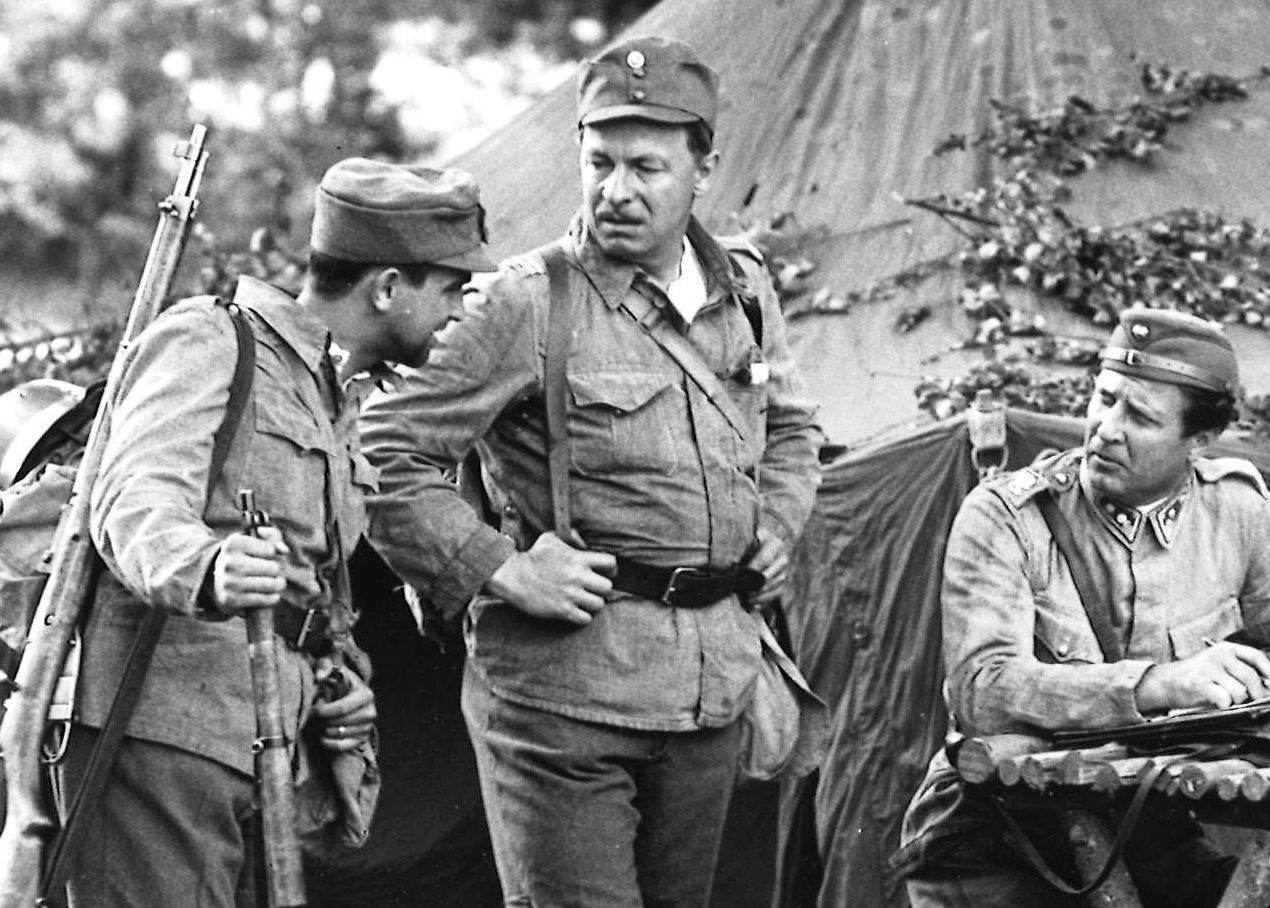 Tuntemattoman sotilaan teatteriesitys Pyynikillä Tampereella. Vasemmalla Mikko Majanlahden Suen Tassu, keskellä Tapio Hämäläisen Rokka ja oikealla Helge Heralan Lammio.